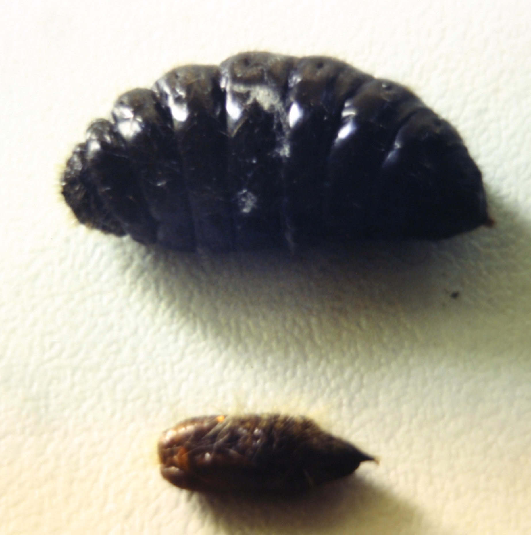 Crisalide di femmina e maschio - Sicily